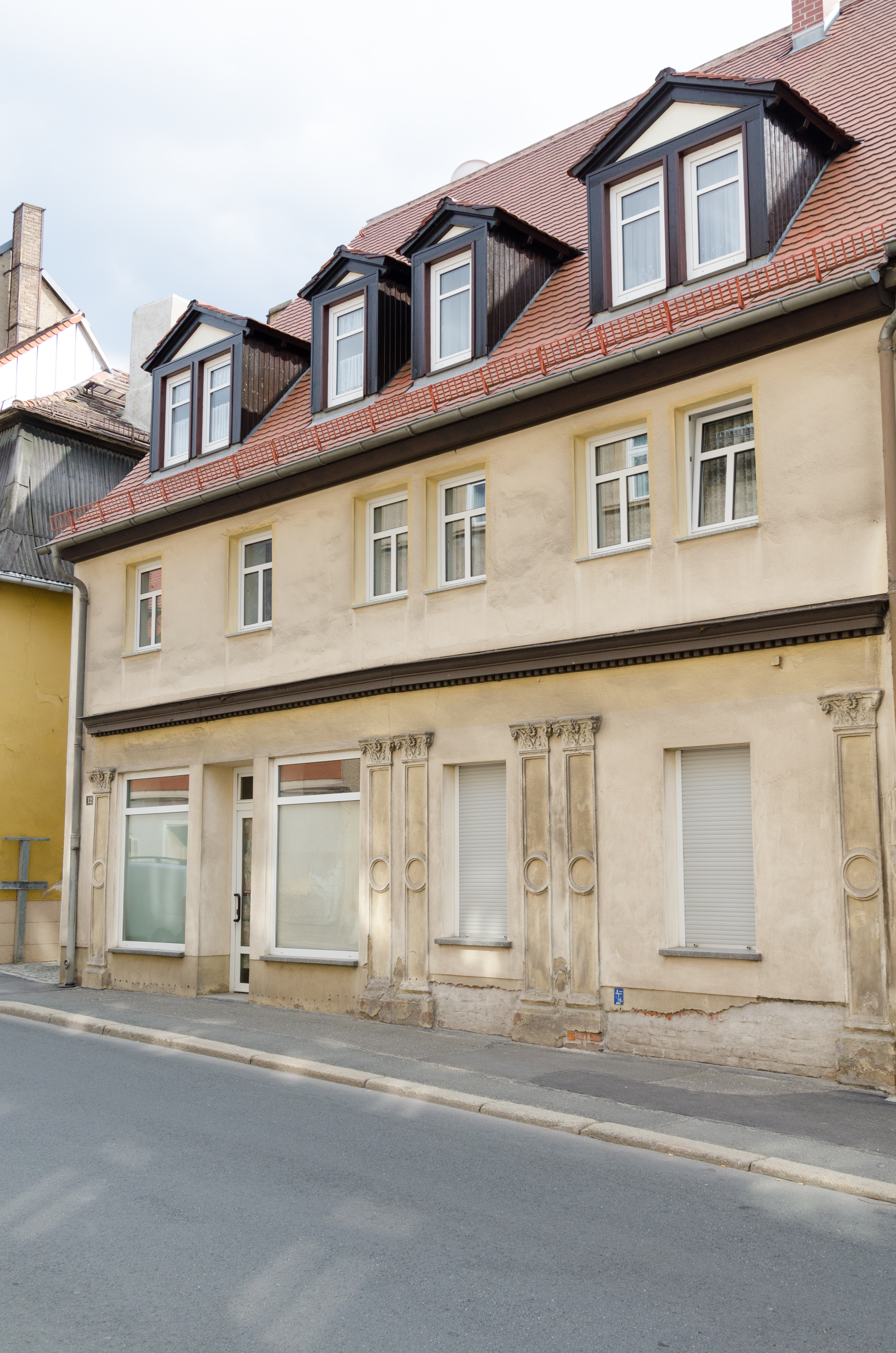 Zeitz, Kalkstraße 12